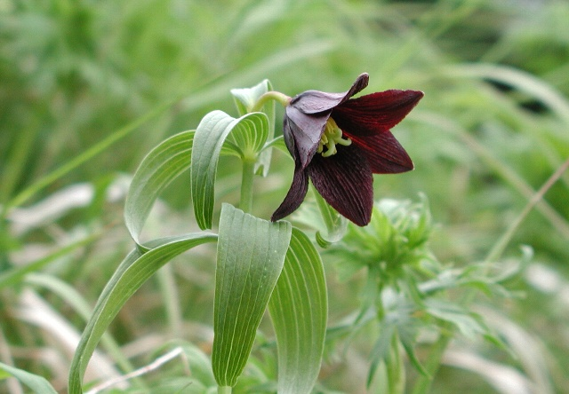 エゾクロユリ。北海道大雪山黒岳。